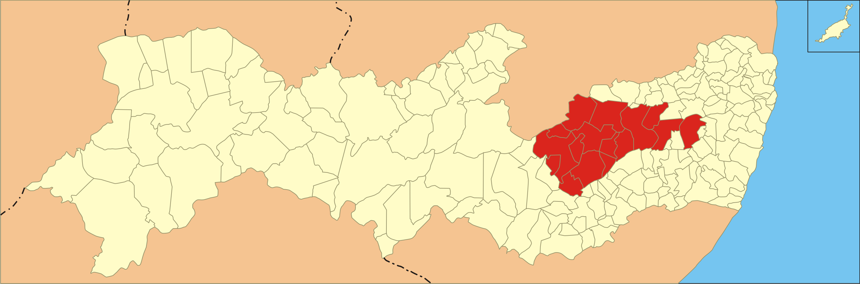 Localização da microrregião no estado de Pernambuco.